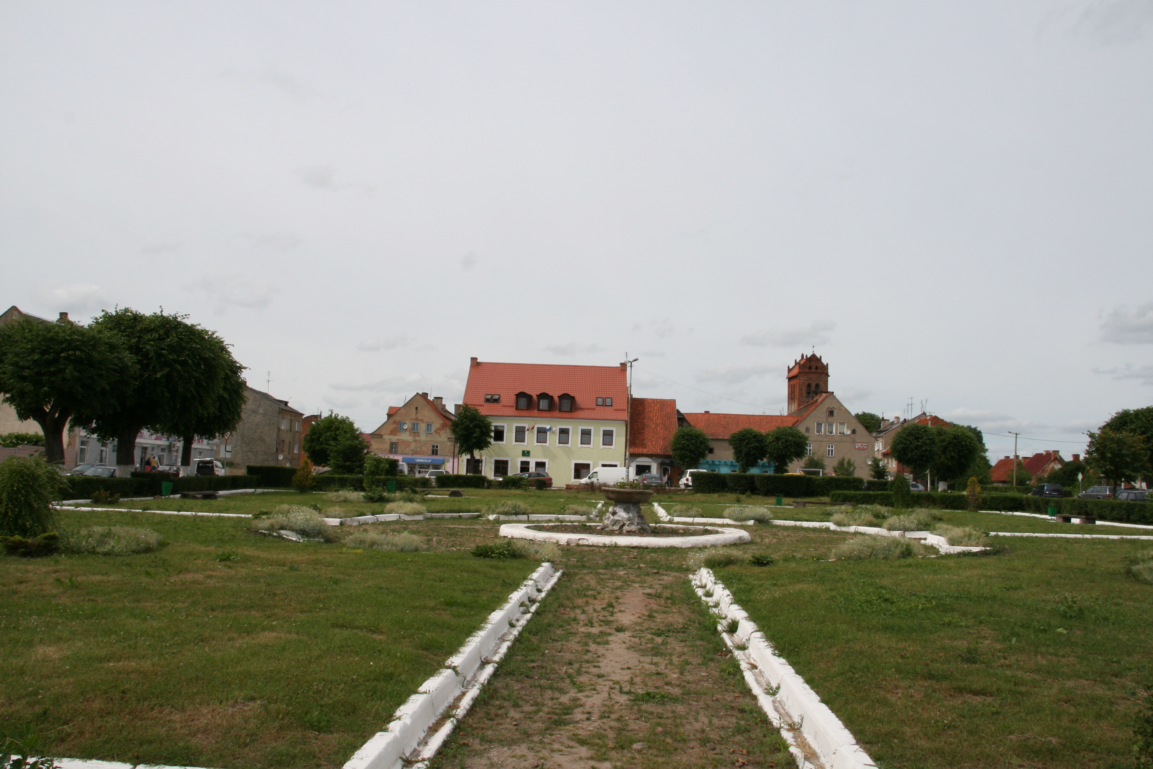 heutiger Marktplatz von Gerdauen/Schelesnodoroschny, bis in die 1960er Jahre war dieses Gelände bebaut